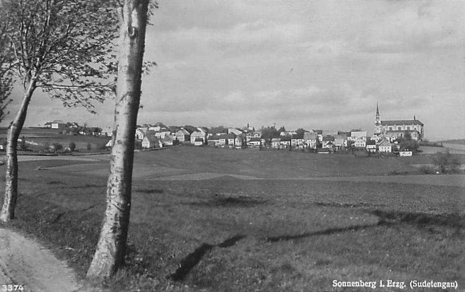 Výsluní, pohled na město od jihozápadu. Vpravo kostel svatého Václava.